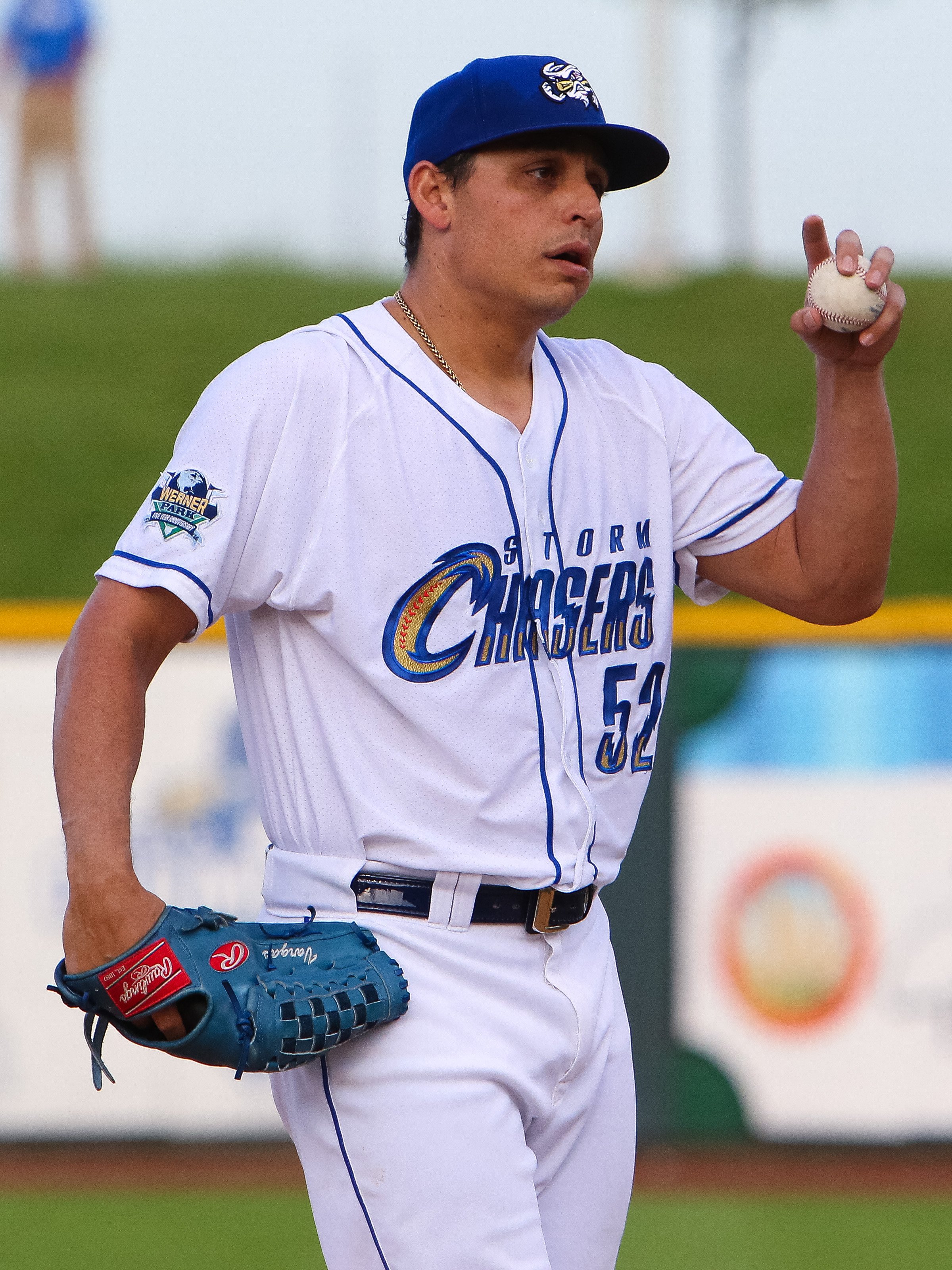 Jason Vargas